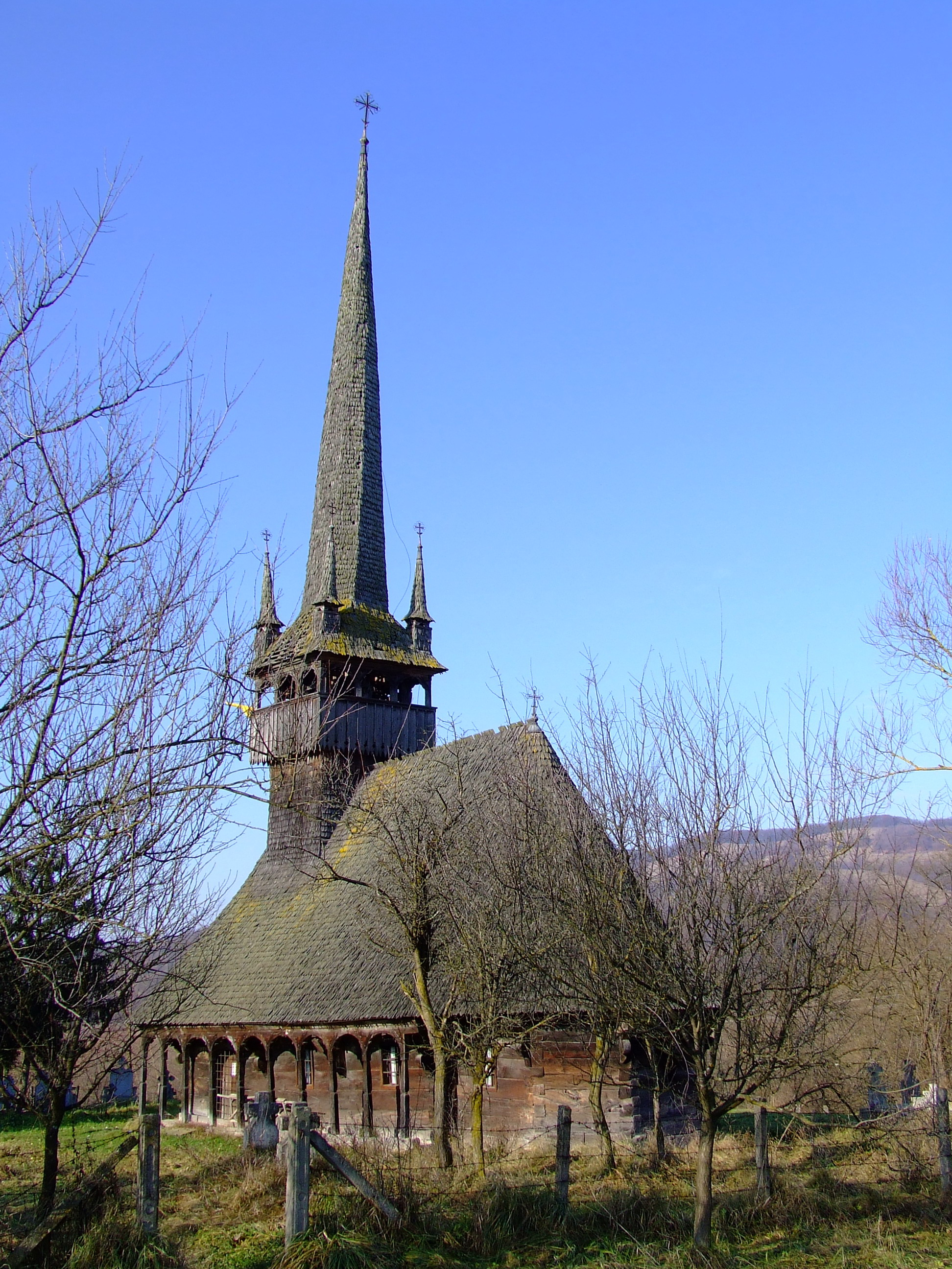 Biserica de lemn din Fodora, judeţul Sălaj. Autor: Bogdan Ilieş Data: noiembrie 2006